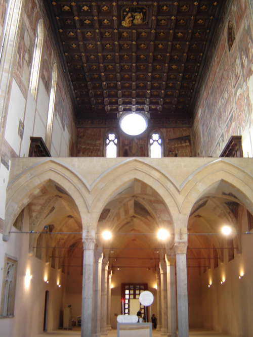 Chiesa di Donnaregina Vecchia, interno (Napoli)